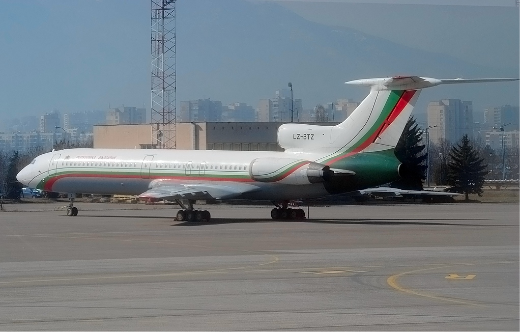 Aviodetachment 28 Tupolev Tu-154M